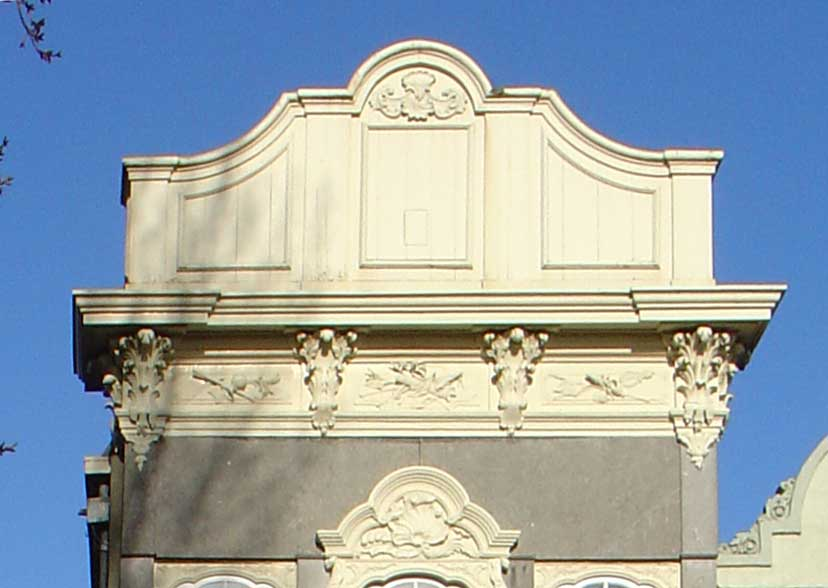 Admiraalshuis (geveldetail) op de Turfmarkt te Gouda